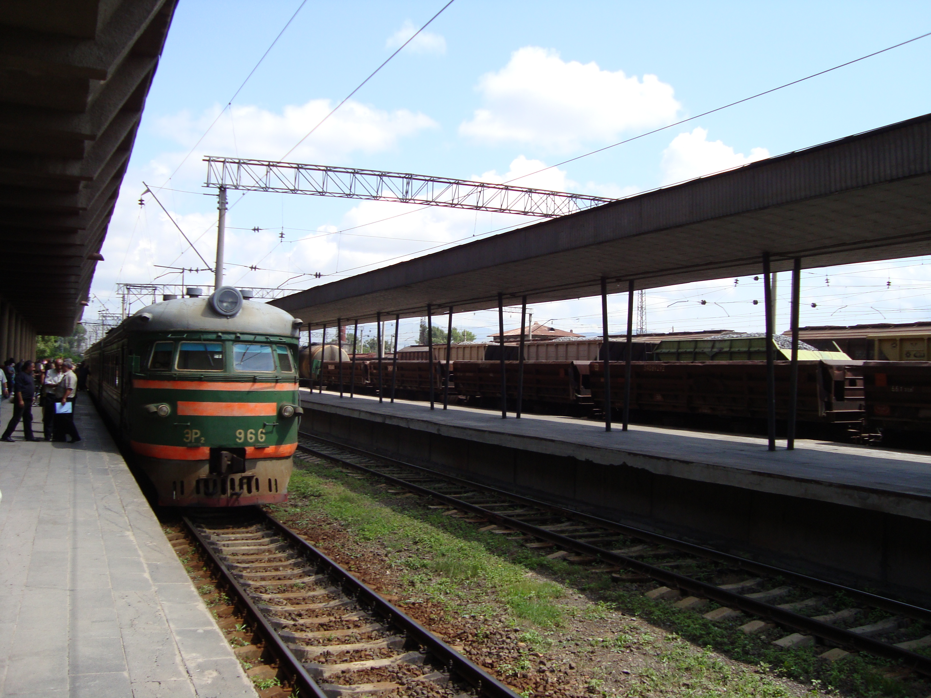 Railroad station in Gumri, marz (province) Shirak, Republic of Armenia